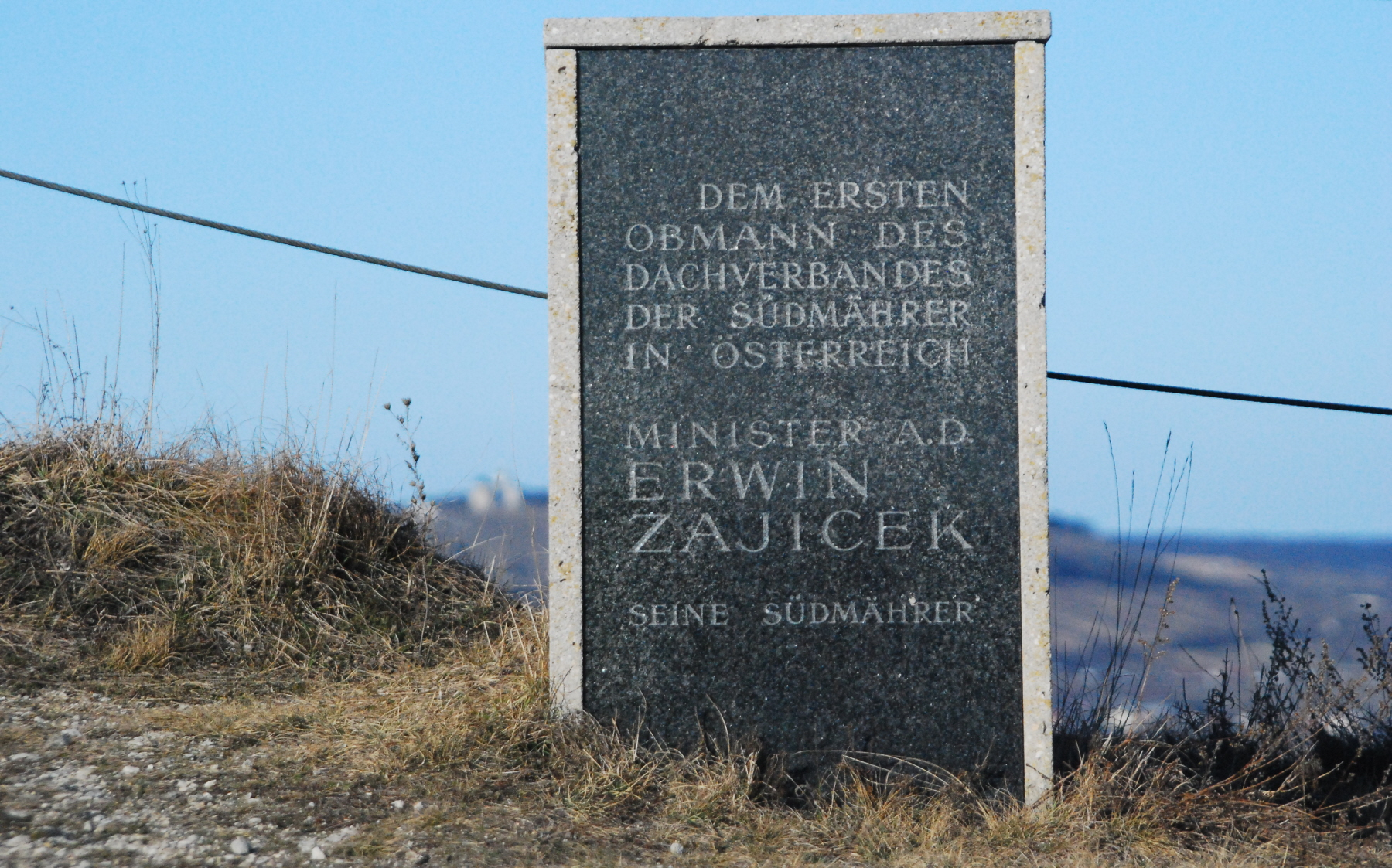 Gedenkstein für Erwin Zajicek beim Südmährenkreuz auf dem Schweinbarther Berg bei Kleinschweinbarth in Niederösterreich